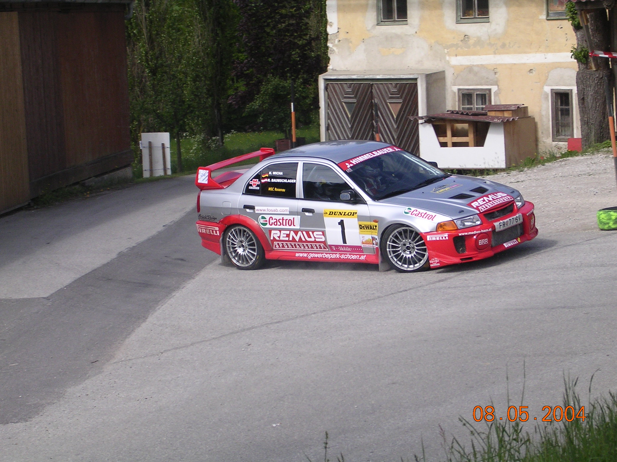 Raimund ("Mundl") Baumschlager bei der Dunlop Pyhrn Eisenwurzen Rallye 2004